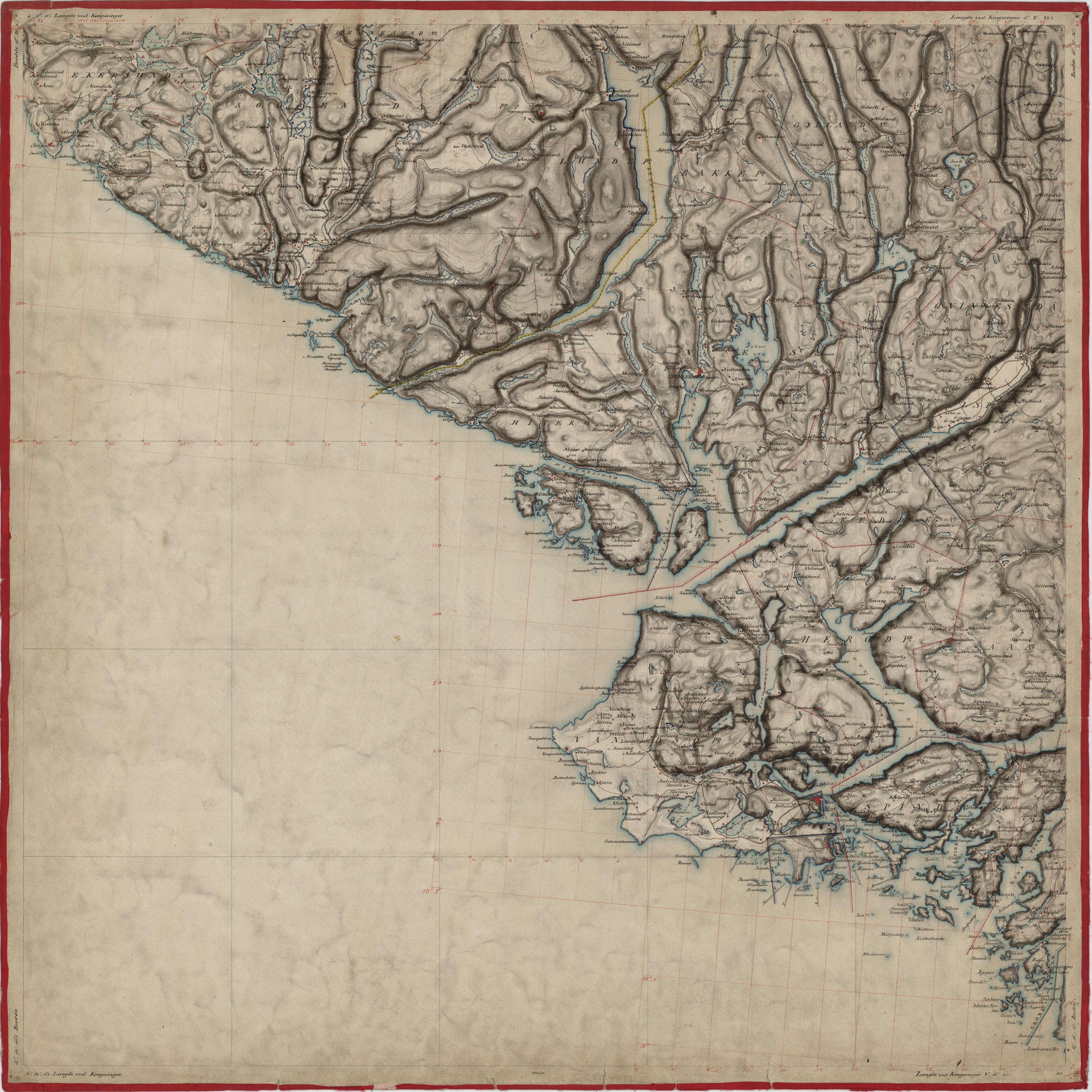 Løpenummer 1